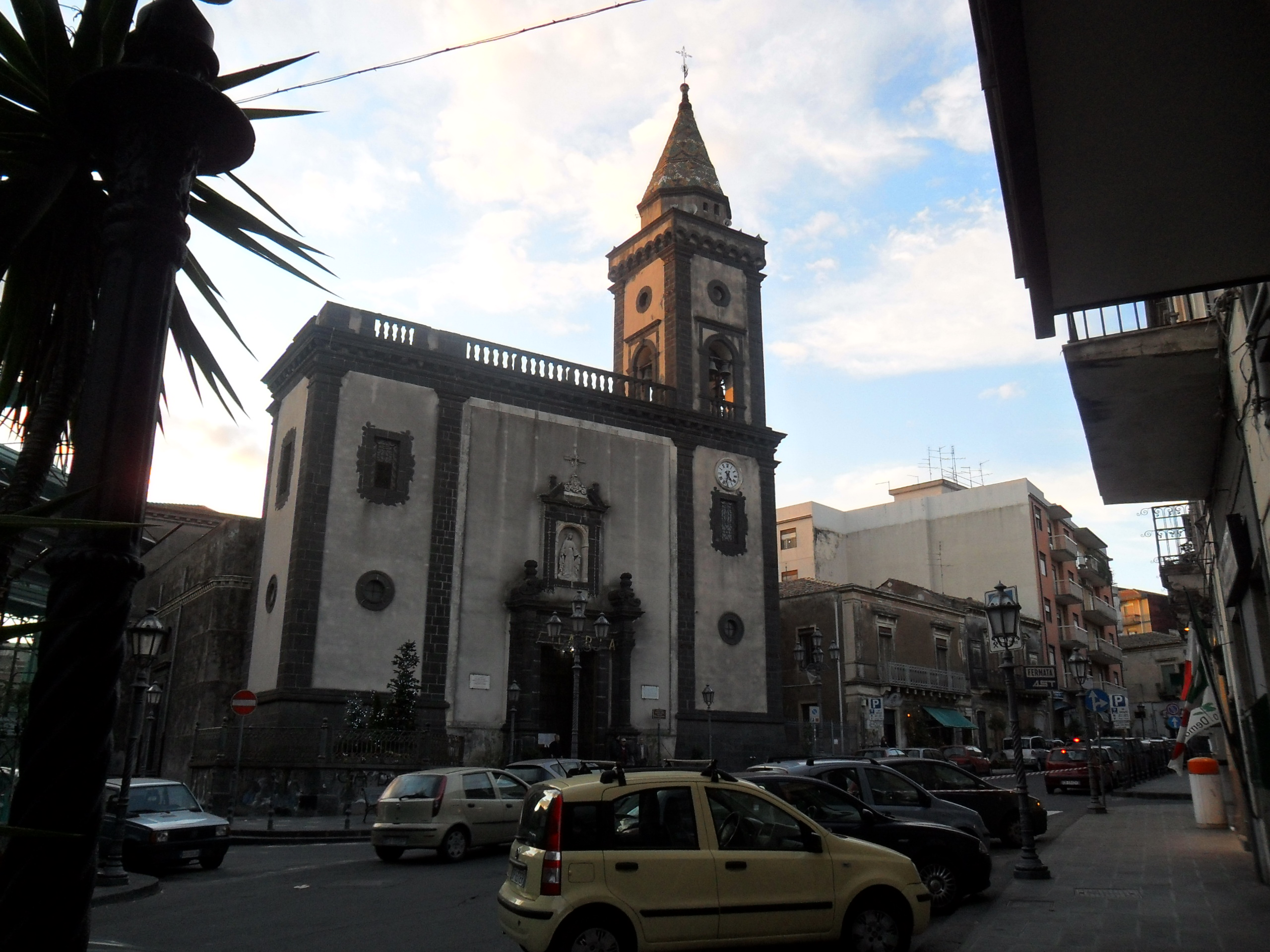 Chiesa Madre e Santuario della Madonna della Consolazione di Mascalucia.